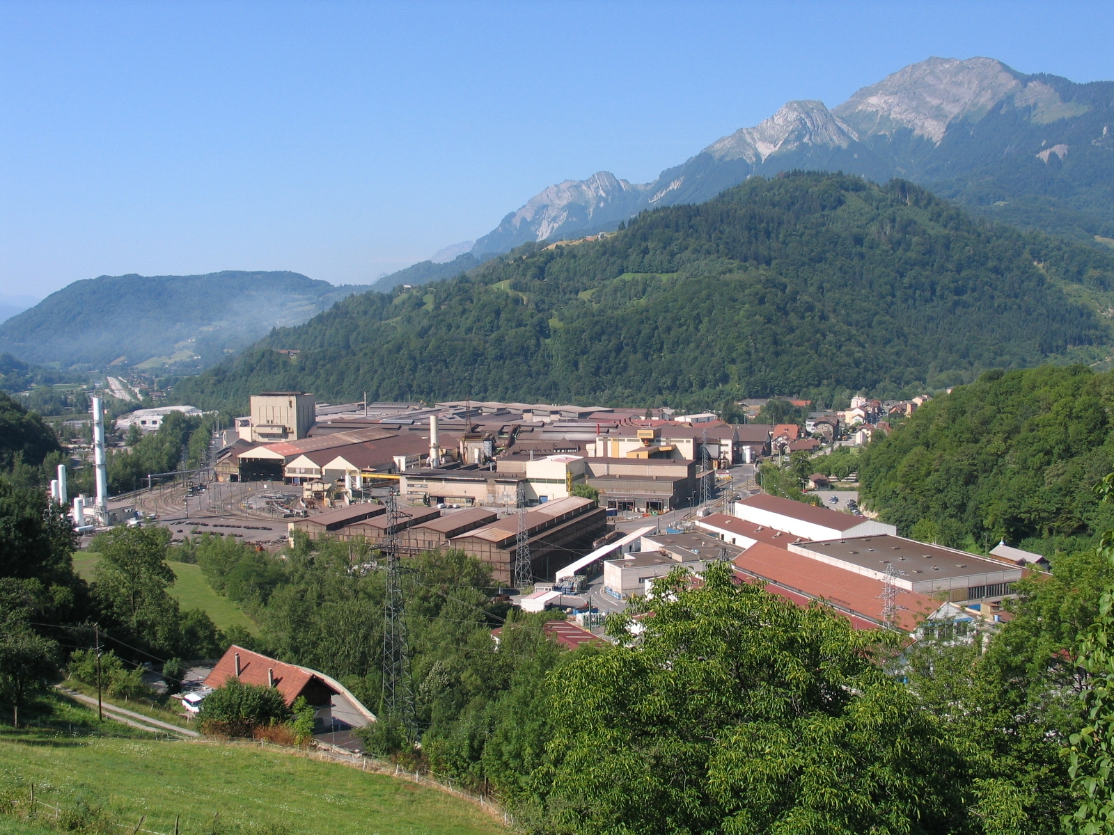 Ugine en Savoie est l’unité principale d'Ugitech avec son aciérie, laminoir et parachèvements mais aussi son centre de recherche.